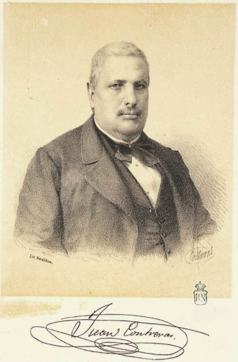 Fotografía y firma manuscrita